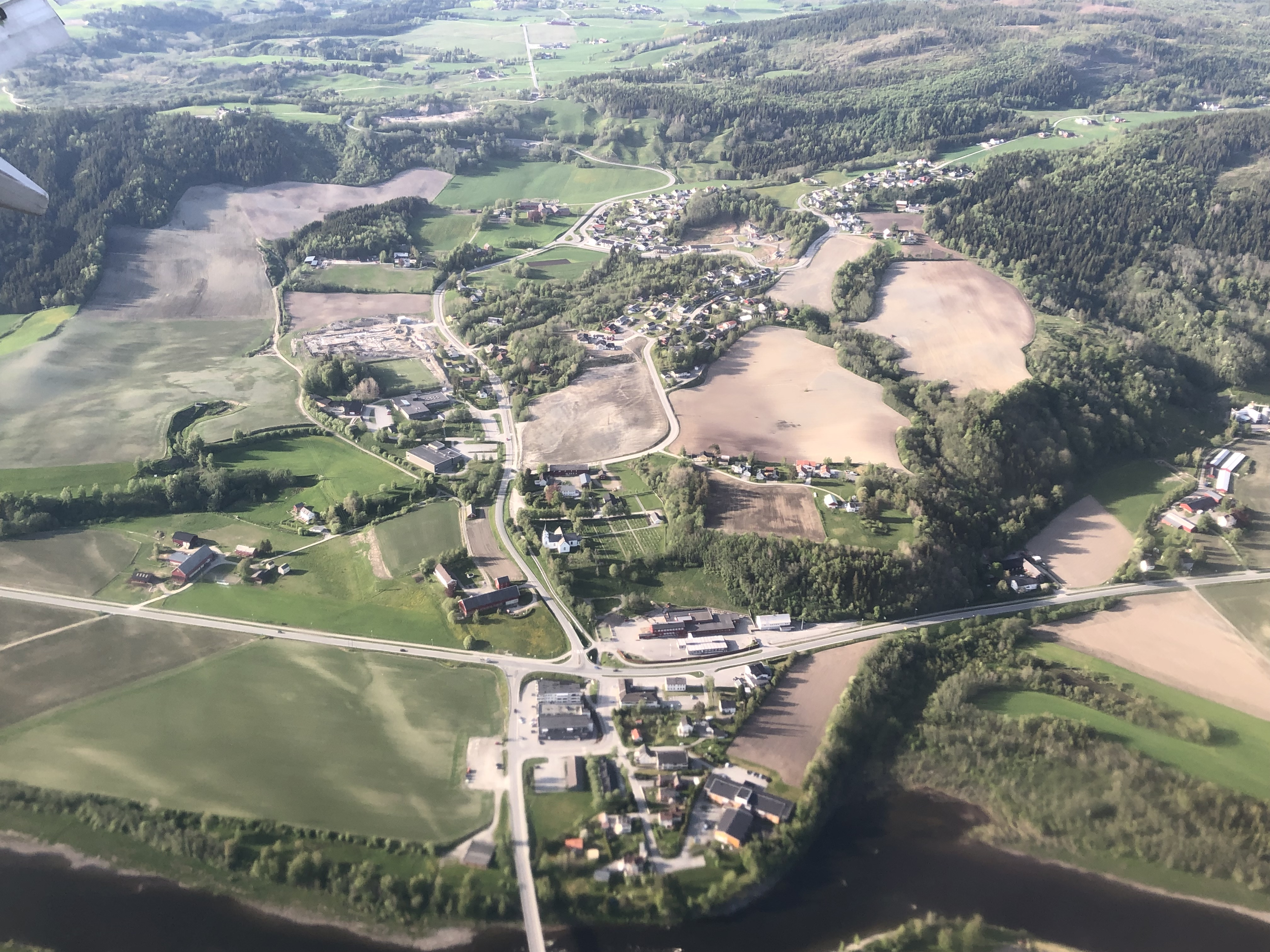 Hegramo (nederst i bildet), bygdesenter i Hegra i Stjørdal kommune i Trøndelag fylke, Norge. Nederst skimtes Stjørdalselva. Veien på tvers i bildet er Mellomriksveien.